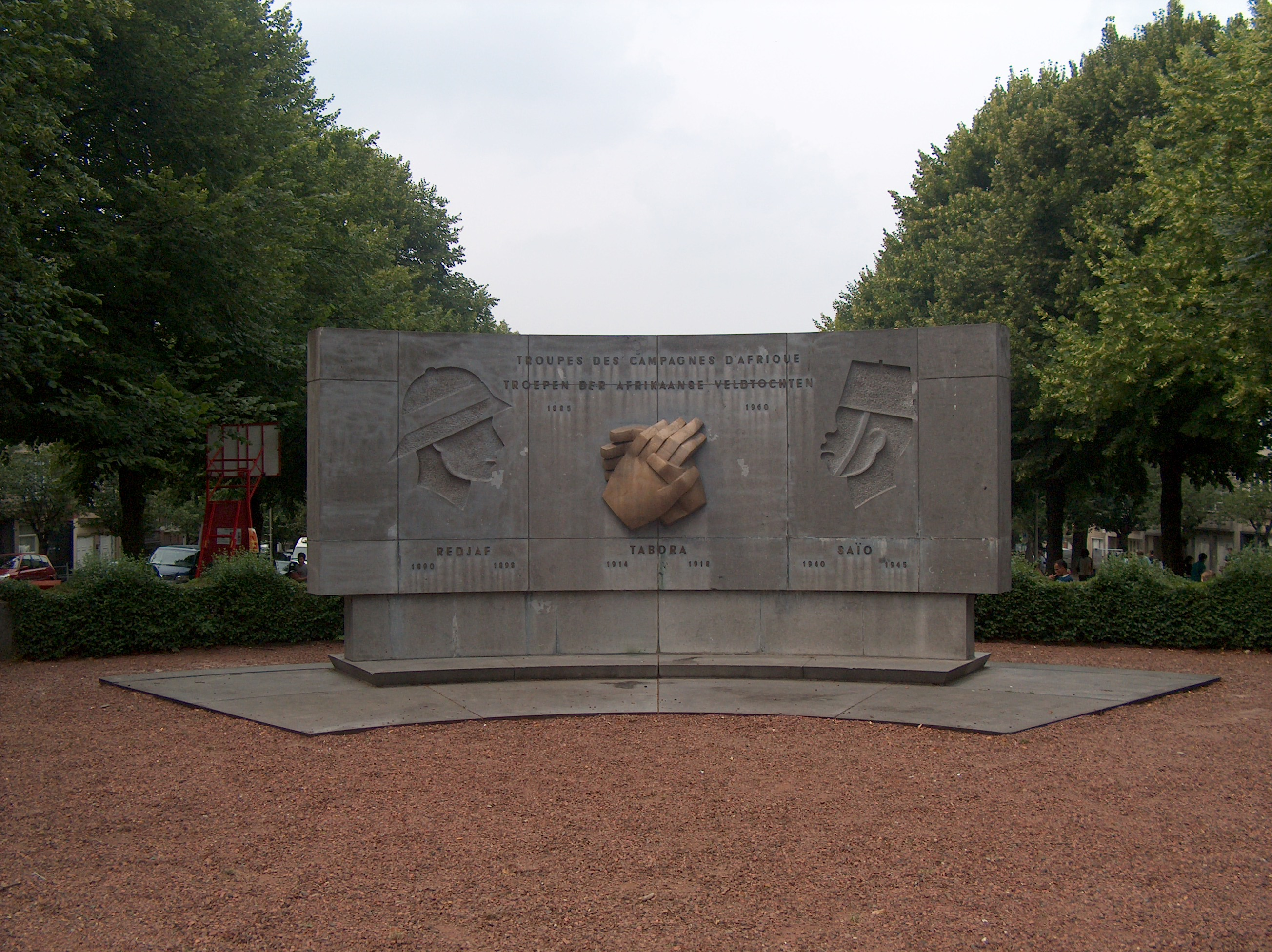 L'avenue Huart Hamoir à Schaerbeek, Bruxelles, Belgique. Monument aux troupes belges en Afrique.